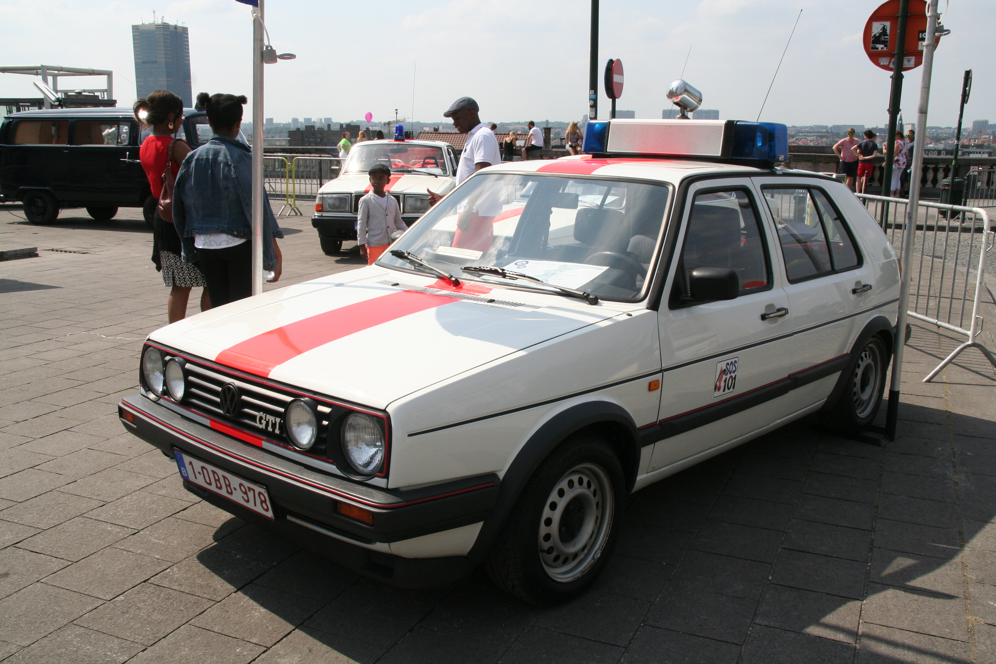 Fête nationale belge à Bruxelles le 21 juillet 2016 - Volkswagen VW Golf GTI de l'ancienne gendarmerie belge